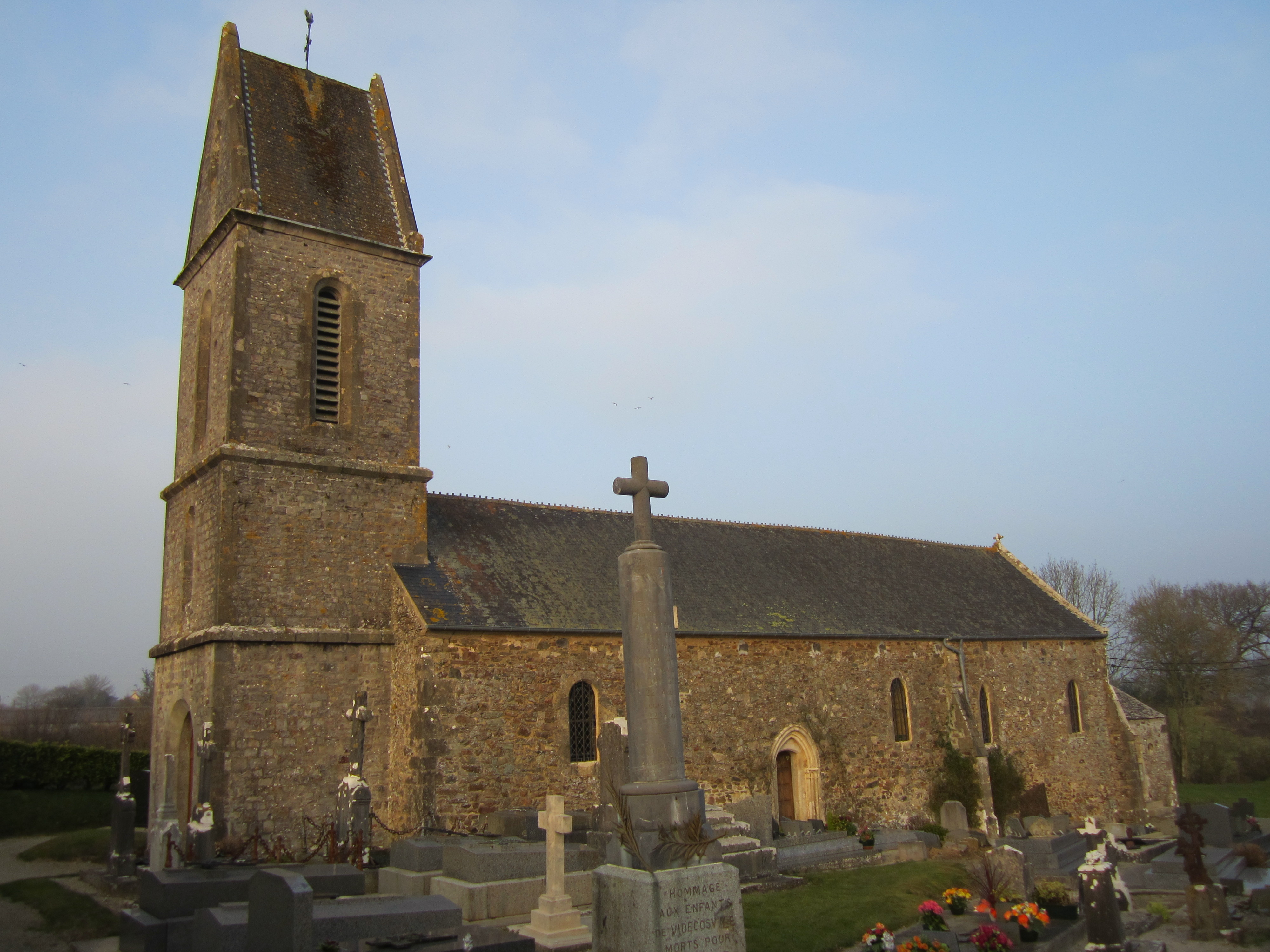 église Saint-Martin de Videcosville